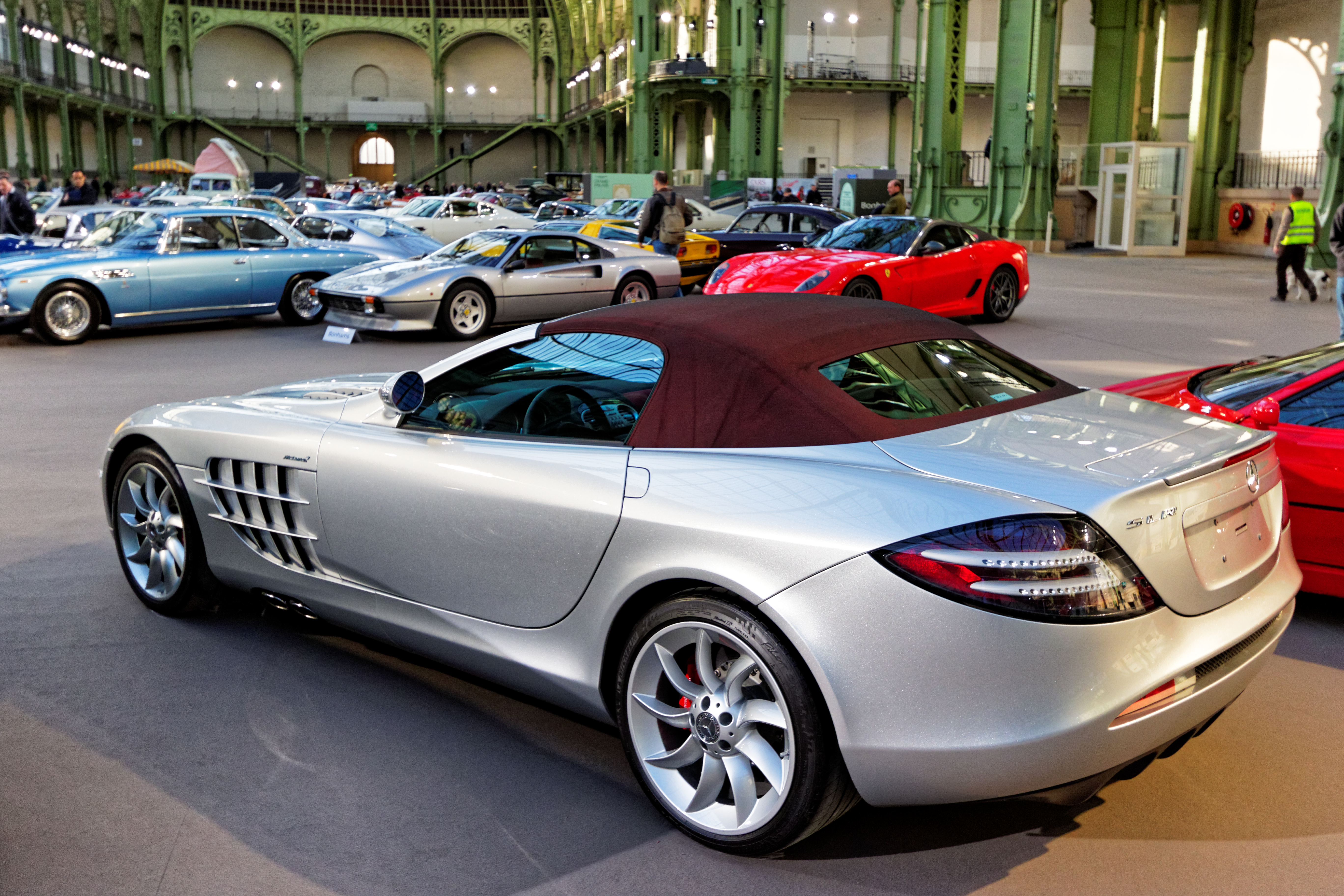 Un des véhicules présenté lors de la vente aux enchères Bonhams 2016 au Grand Palais de Paris.